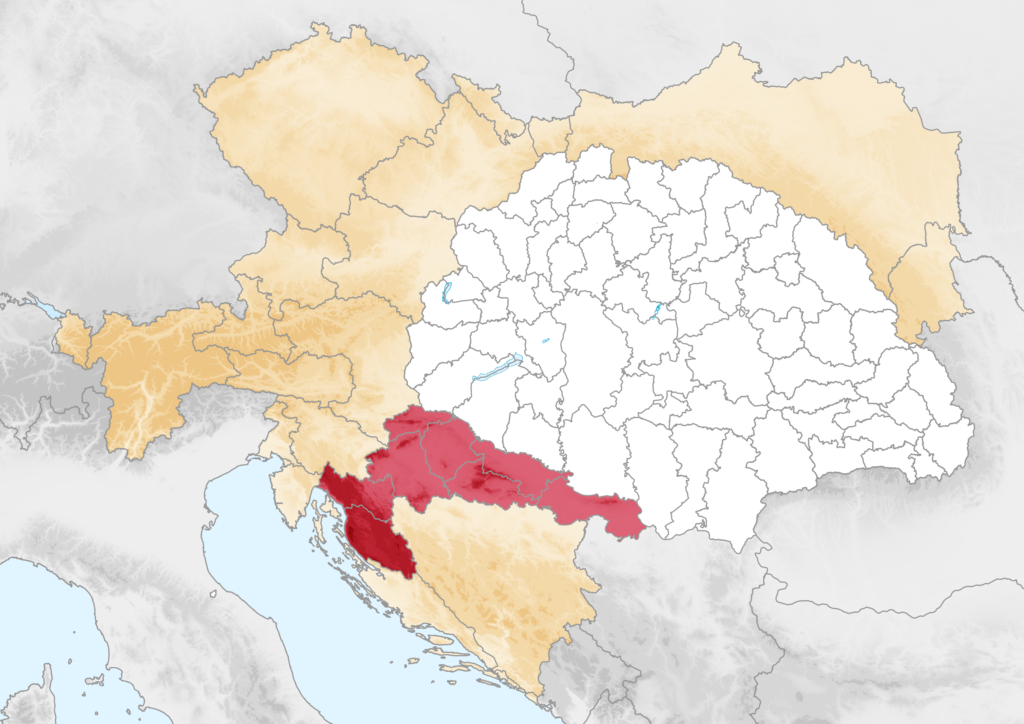 Carte de royaume de Croatie-Slavonie en 1914